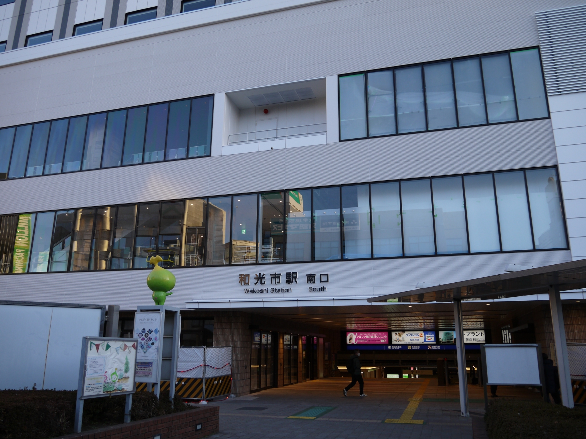 和光市駅南口